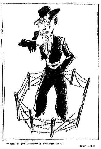 La Humanitat num. humanitat. 368. 14.5.1935